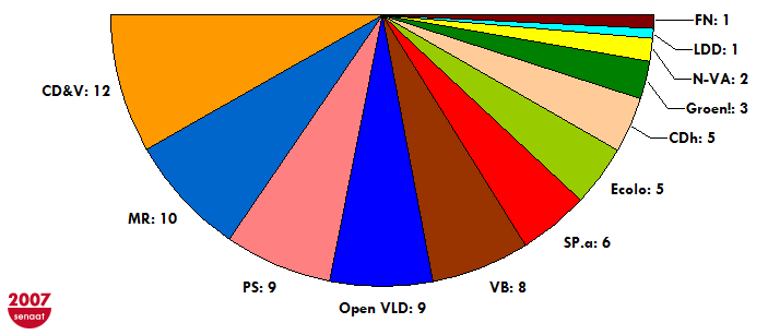 Inaugurale zetelverdeling van de Belgische Federale Senaat in 2007. Combinatie van rechtstreeks verkozen senatoren, gemeenschapssenatoren en gecoöpteerde senatoren. Zonder de apolitieke senatoren van rechtswege (koningskinderen).